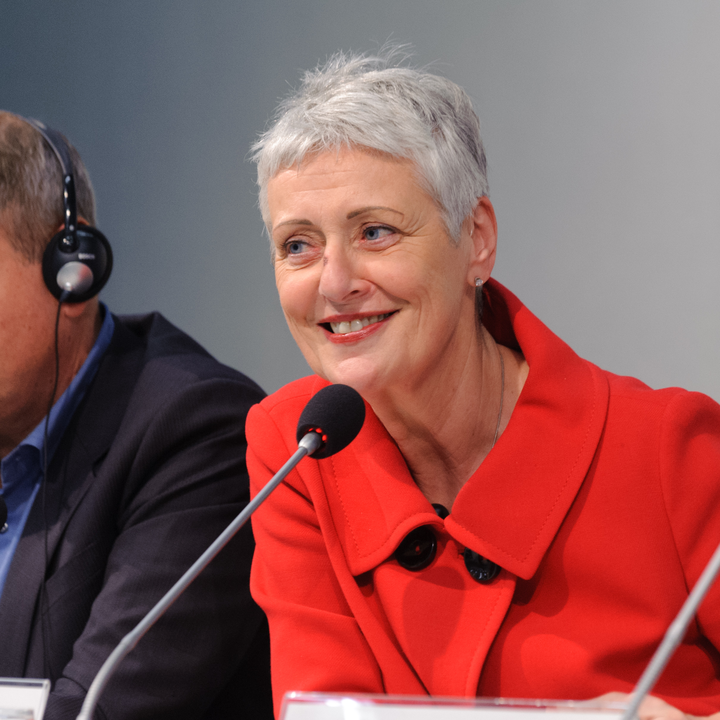 Marieluise Beck (MdB, Bündnis 90/Die Grünen, Berlin) Konferenz: Fremde Freunde?